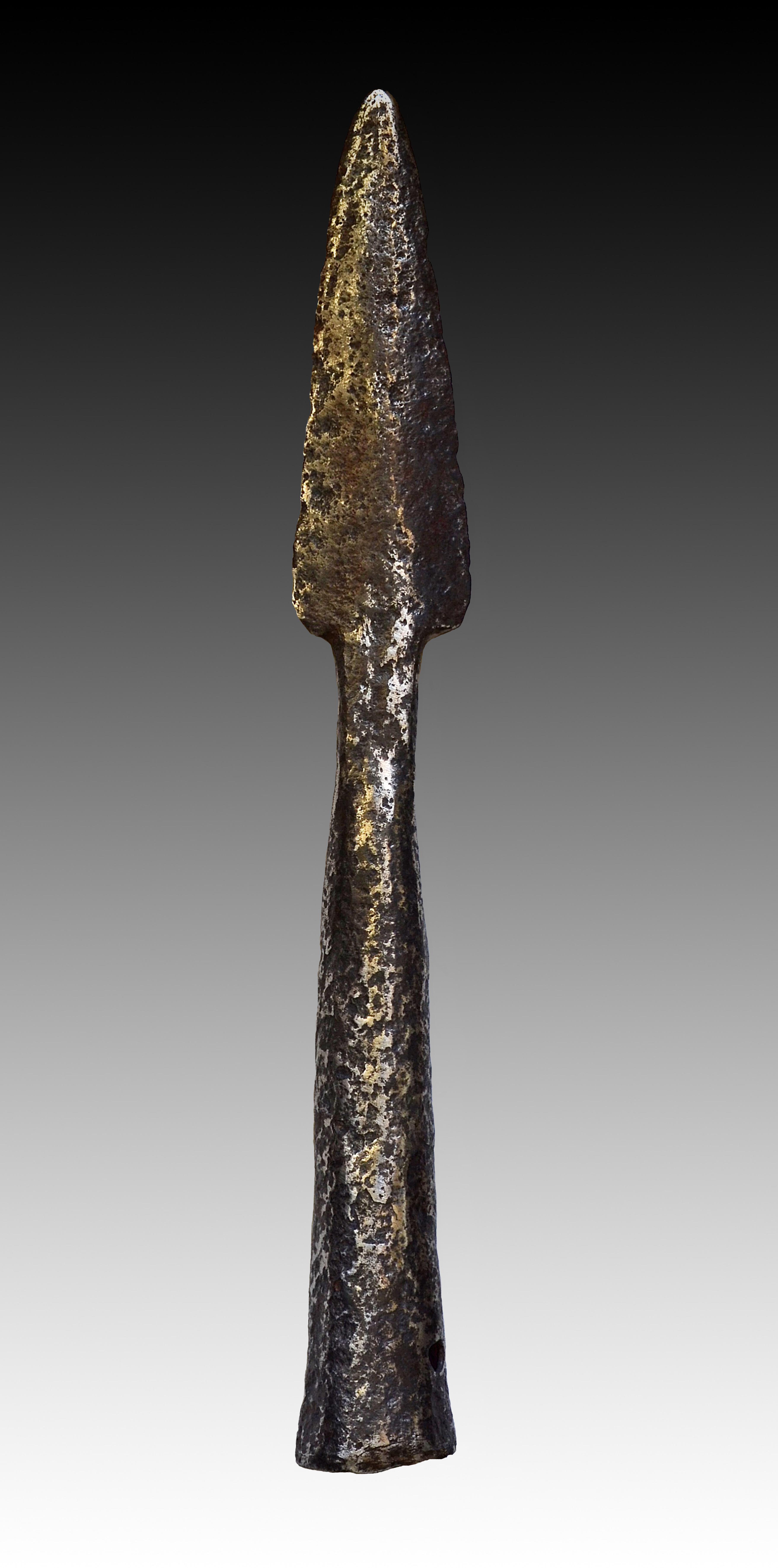 Наконечник копья.Кострома.15-16 века.